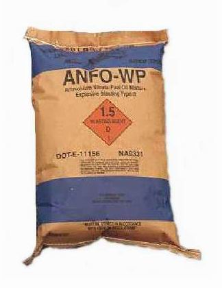 Un sacchetto commerciale di ANFO-WP. Ho creato io questa immagine. Fabexplosive